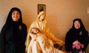 photo de 2 moniales passionistes